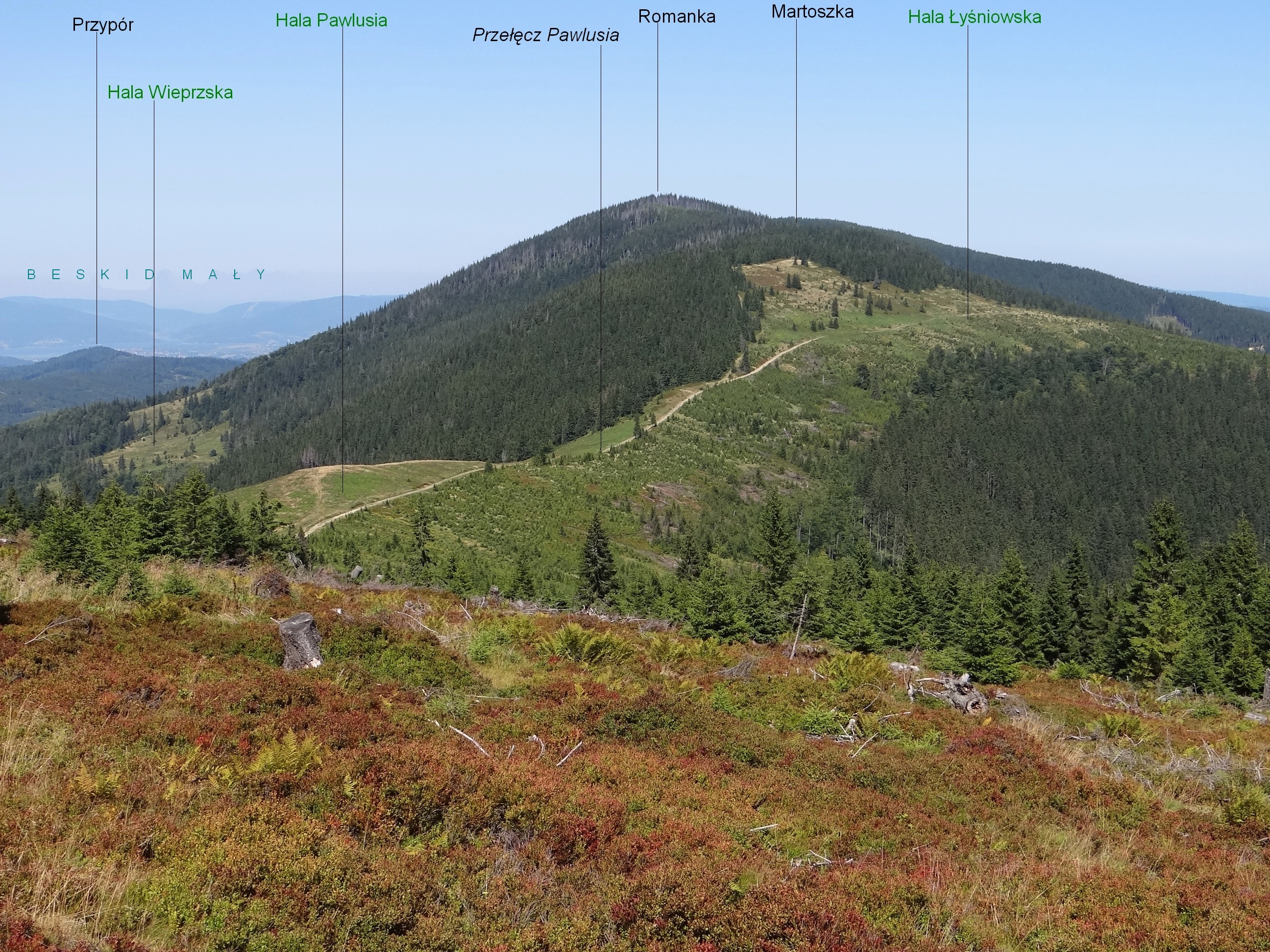 Widok z Rysianki